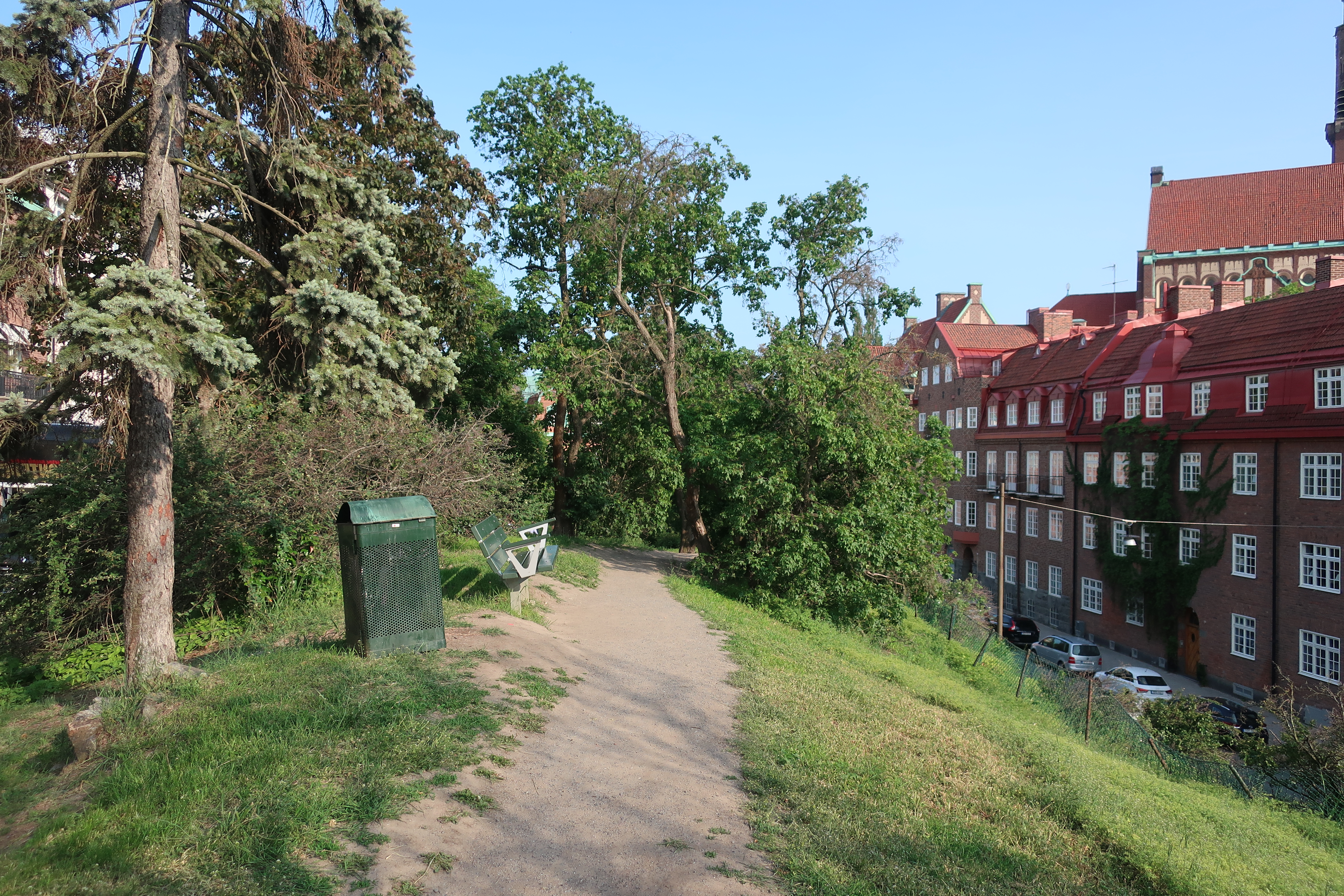 Balders hage, juni 2019.